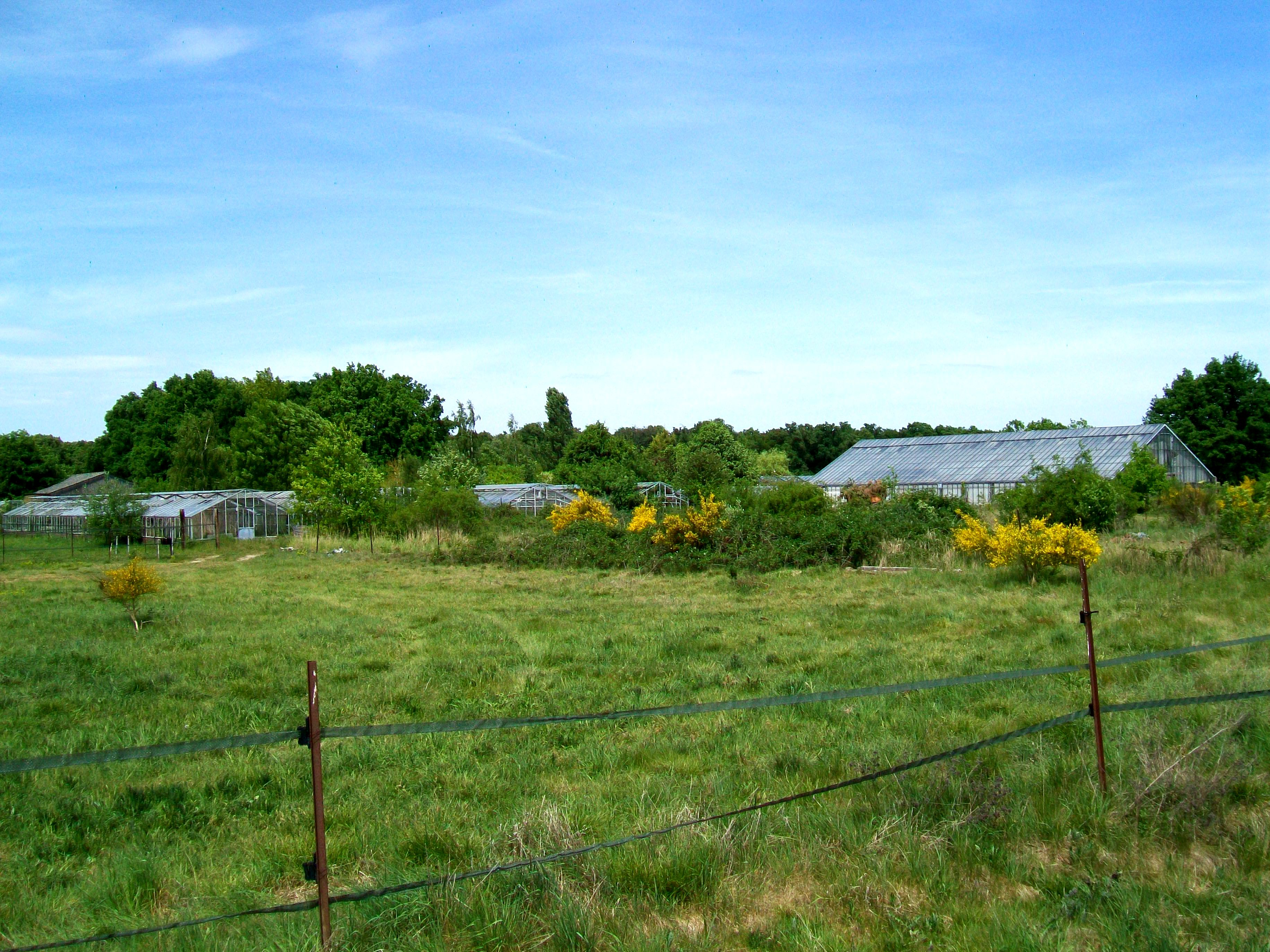 Les serres abandonnées au sud du village, près du chemin rural n° 16 de la Chapelle-en-Serval.